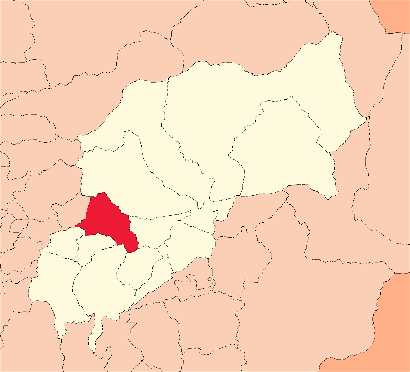 Área del distrito de Quisqui (Kichki).